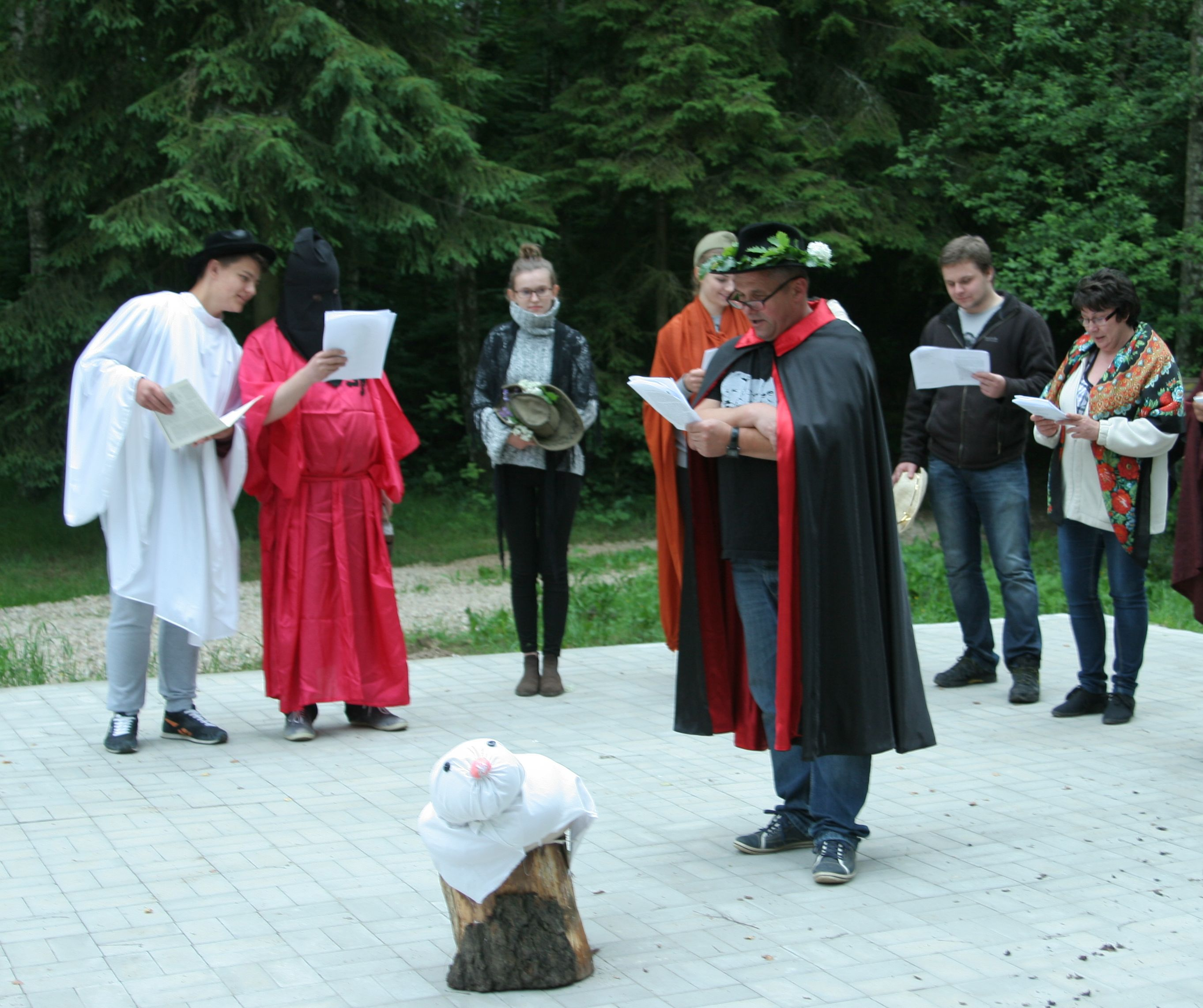 Uczestnicy obrzędu ścinania kani